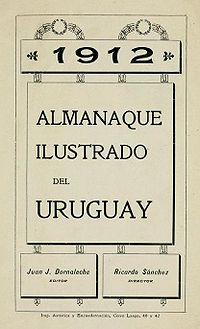 Portada del libro "Almanaque Ilustrado del Uruguay"